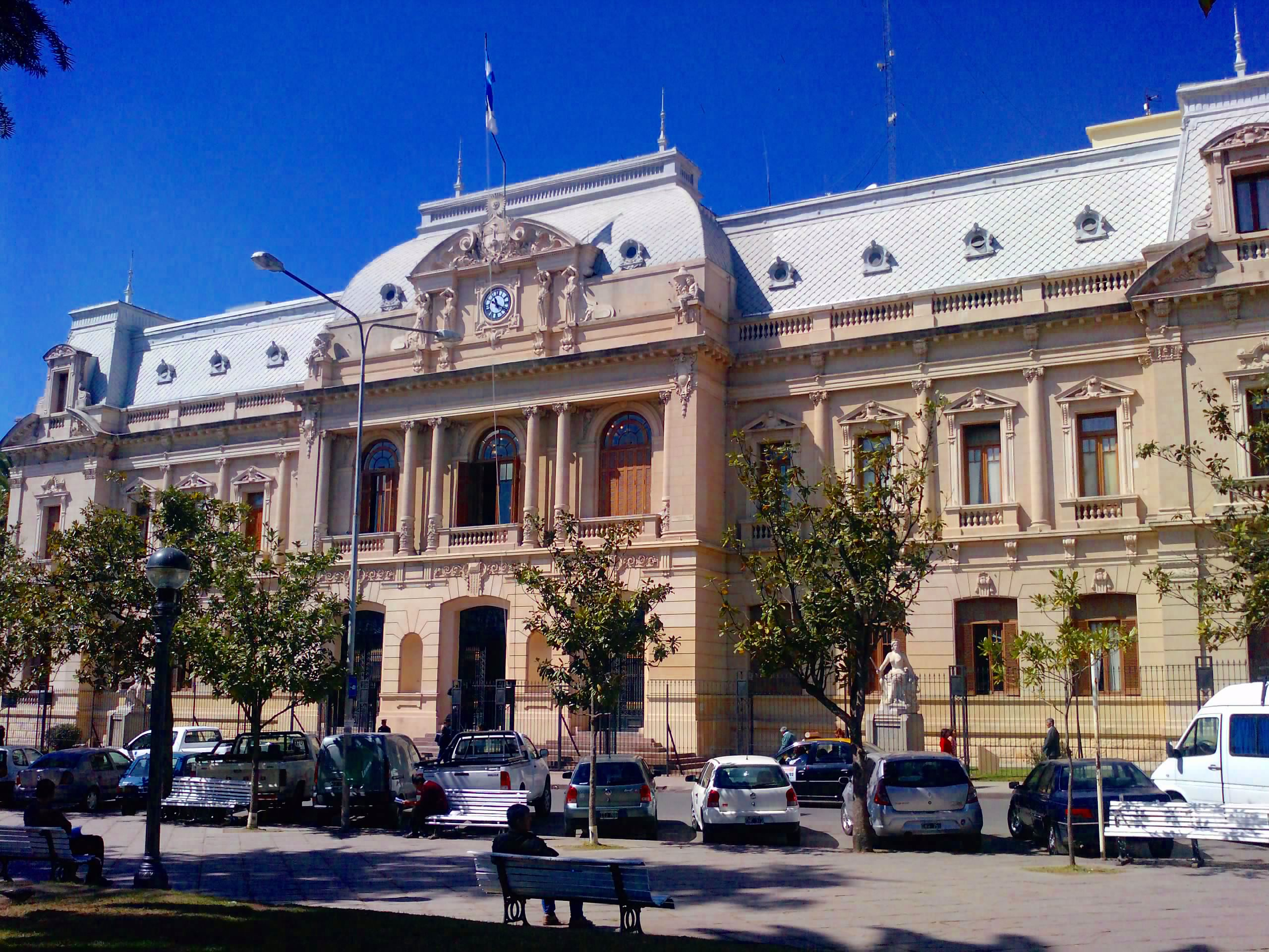 Frente Casa de Gobierno de Jujuy